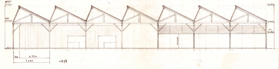 平松毛織工場断面図